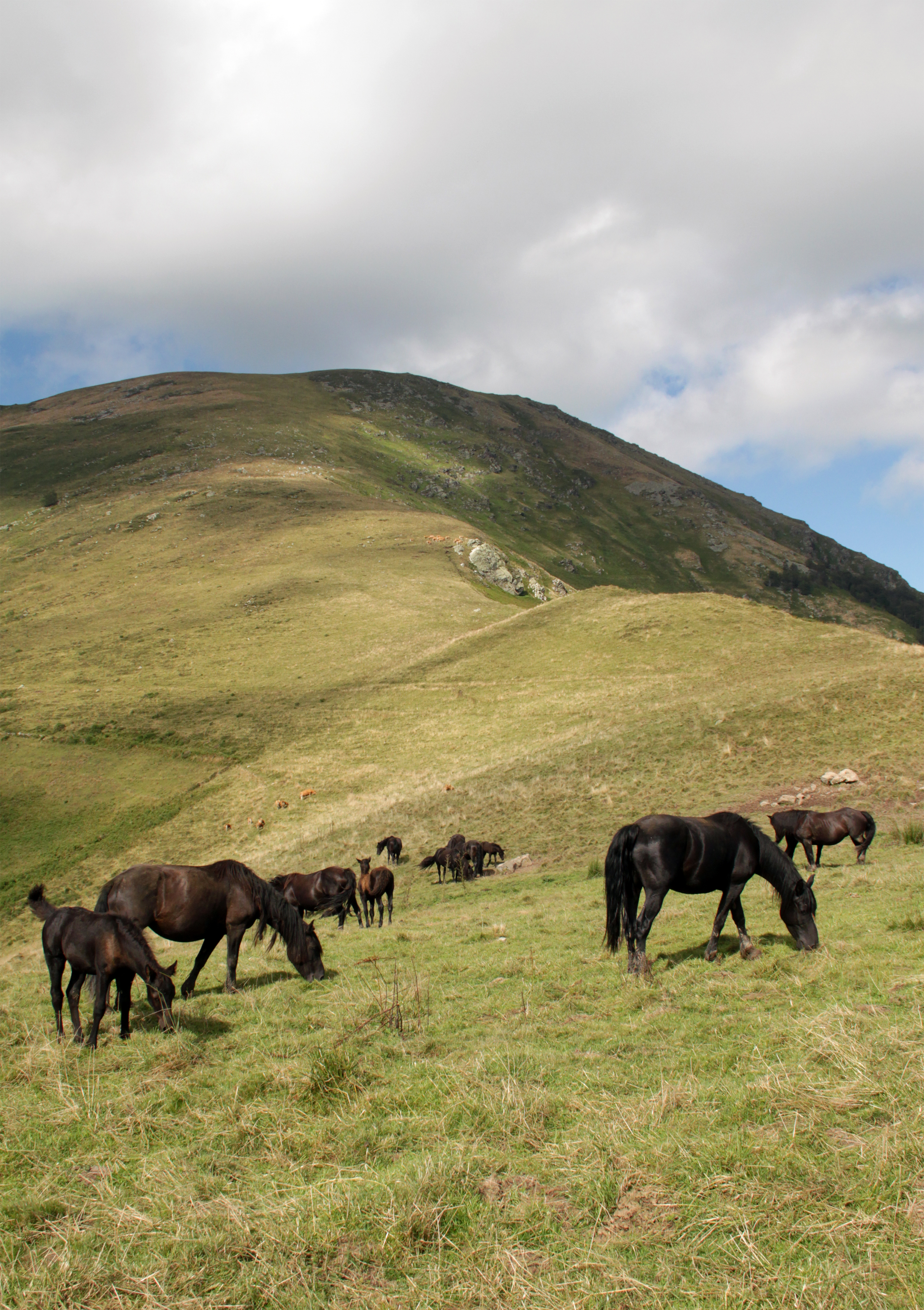 Chevaux Mérens à l'estive au col de la Core, en Août 2018.